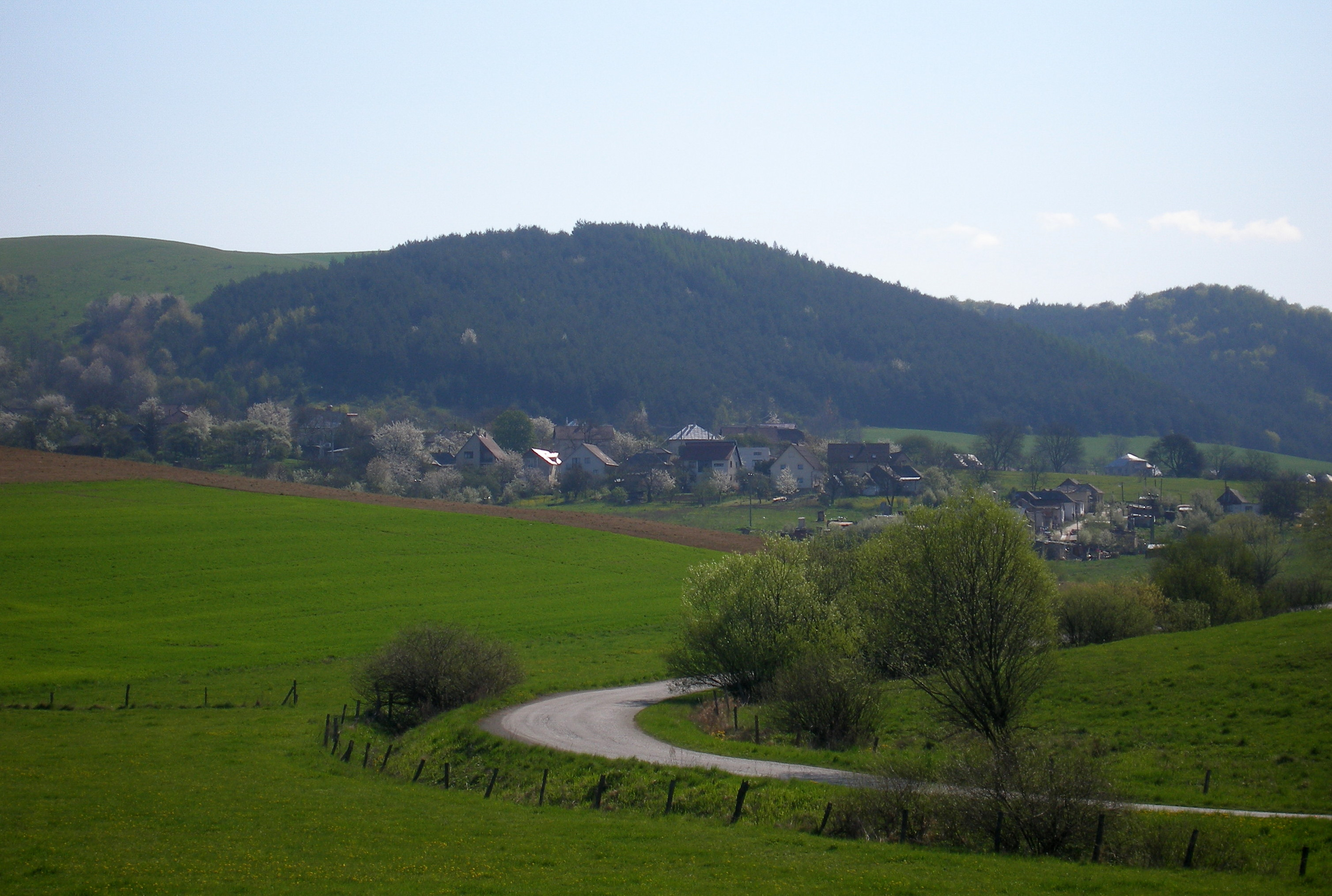 Obec Chmeľov okres Prešov región Šariš